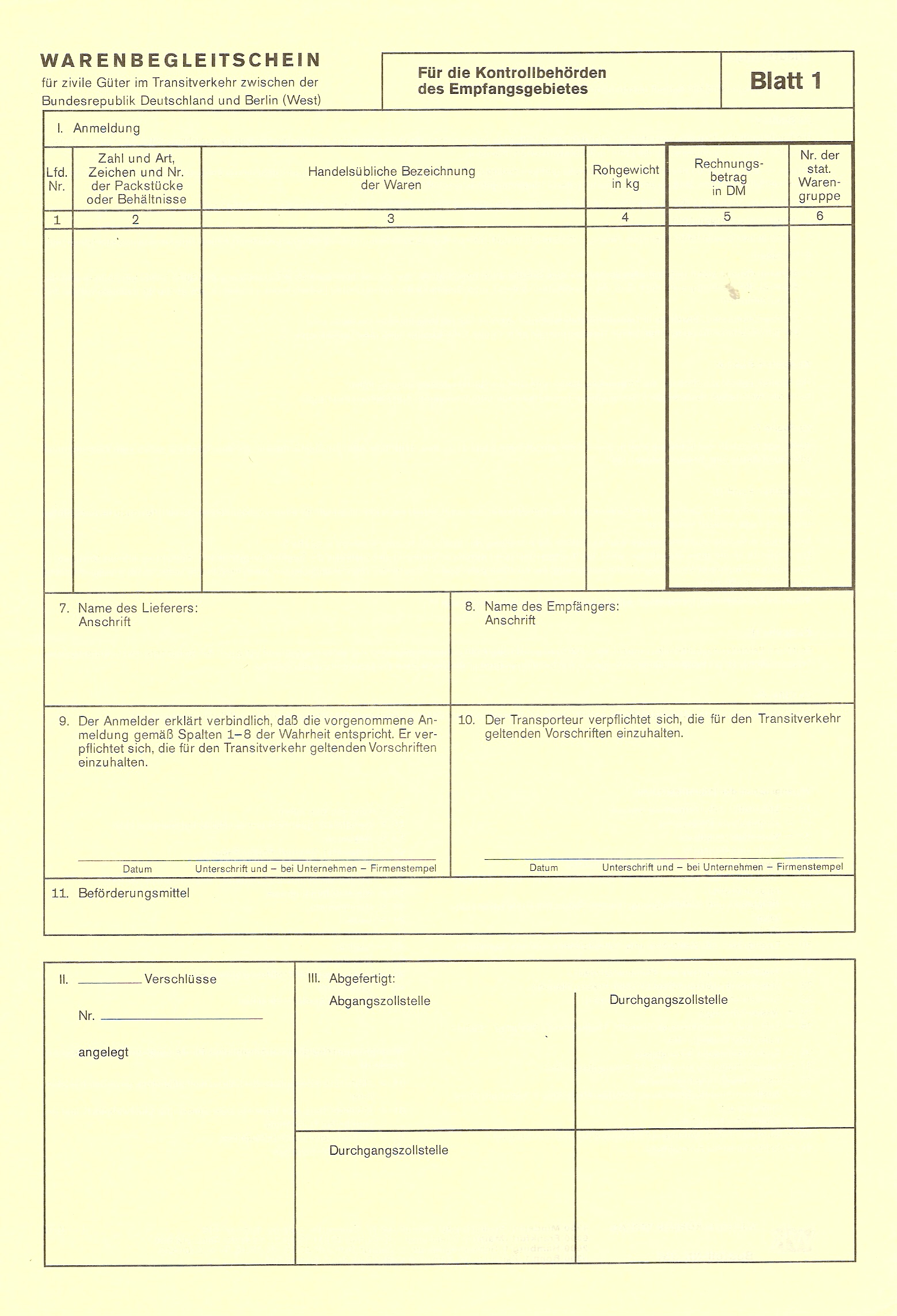 Warenbegleitschein DDR Transit von 1971 - 1990